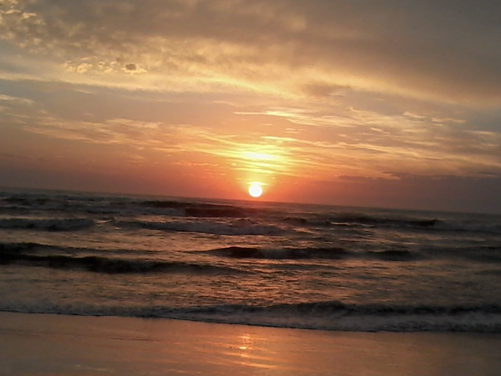 Nascer do sol,fevereiro de 2014.